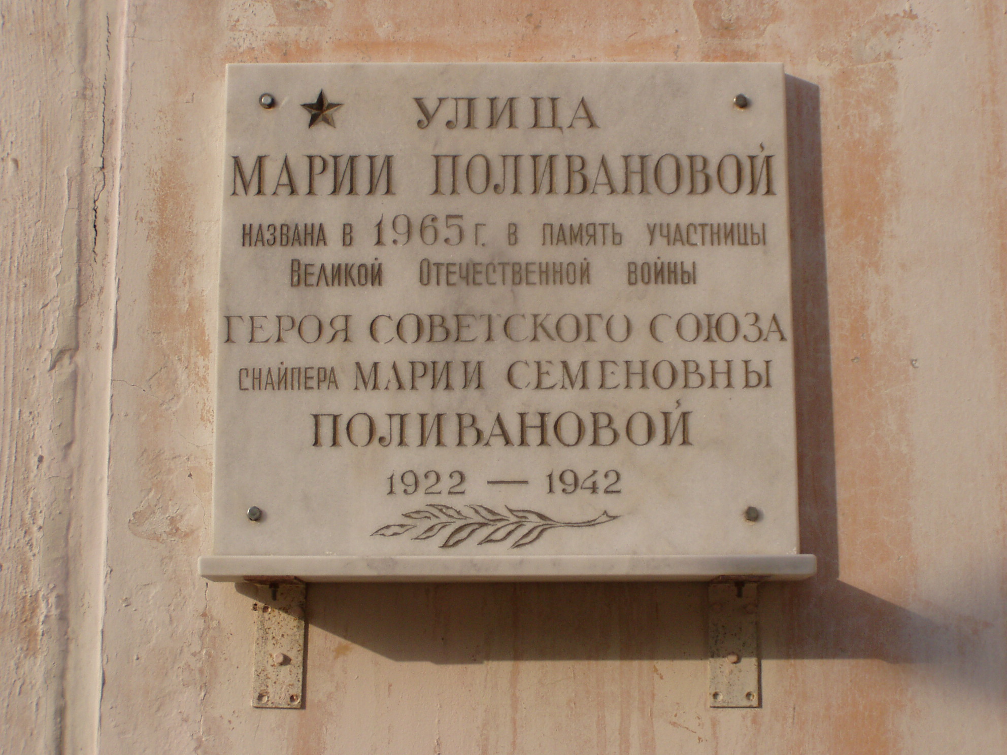 Мемориальная доска на улице Марии Поливановой в Москве.